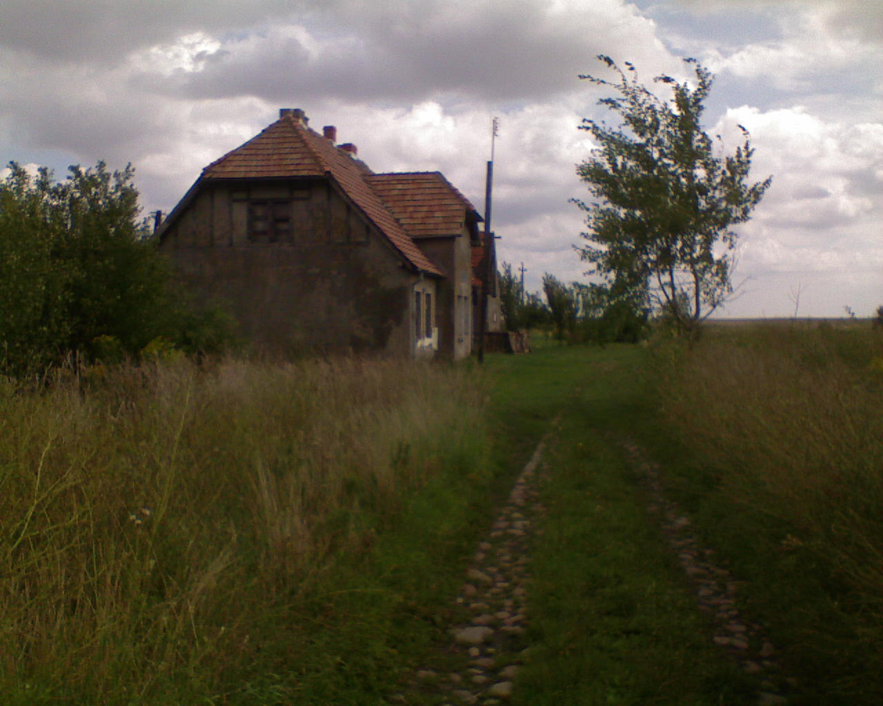 Budynek zlikwidowanej stacji kolei wąskotorowej w Dargosławiu (stan na 2008 r.) - dzisiaj w budynku jest zmieniona dachówka i wymienione okna.